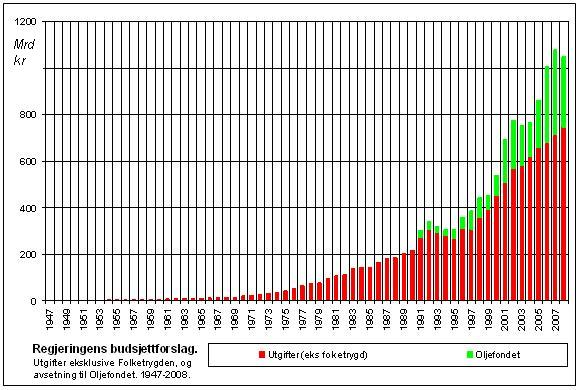 Statsbudsjettets utgifter